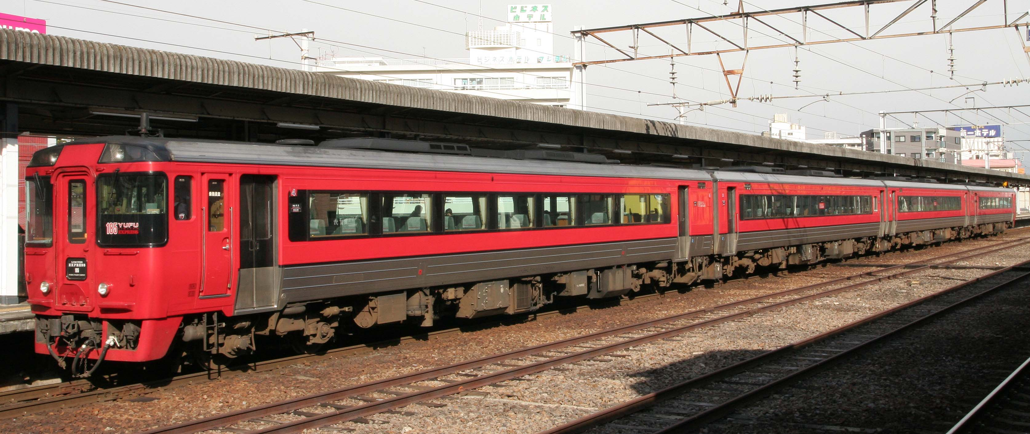 JR九州キハ185系気動車 特急ゆふ 別府